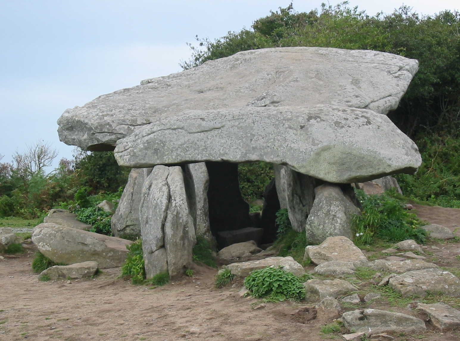 dolmen, Penhap, Île-aux-Moines, Morbihan